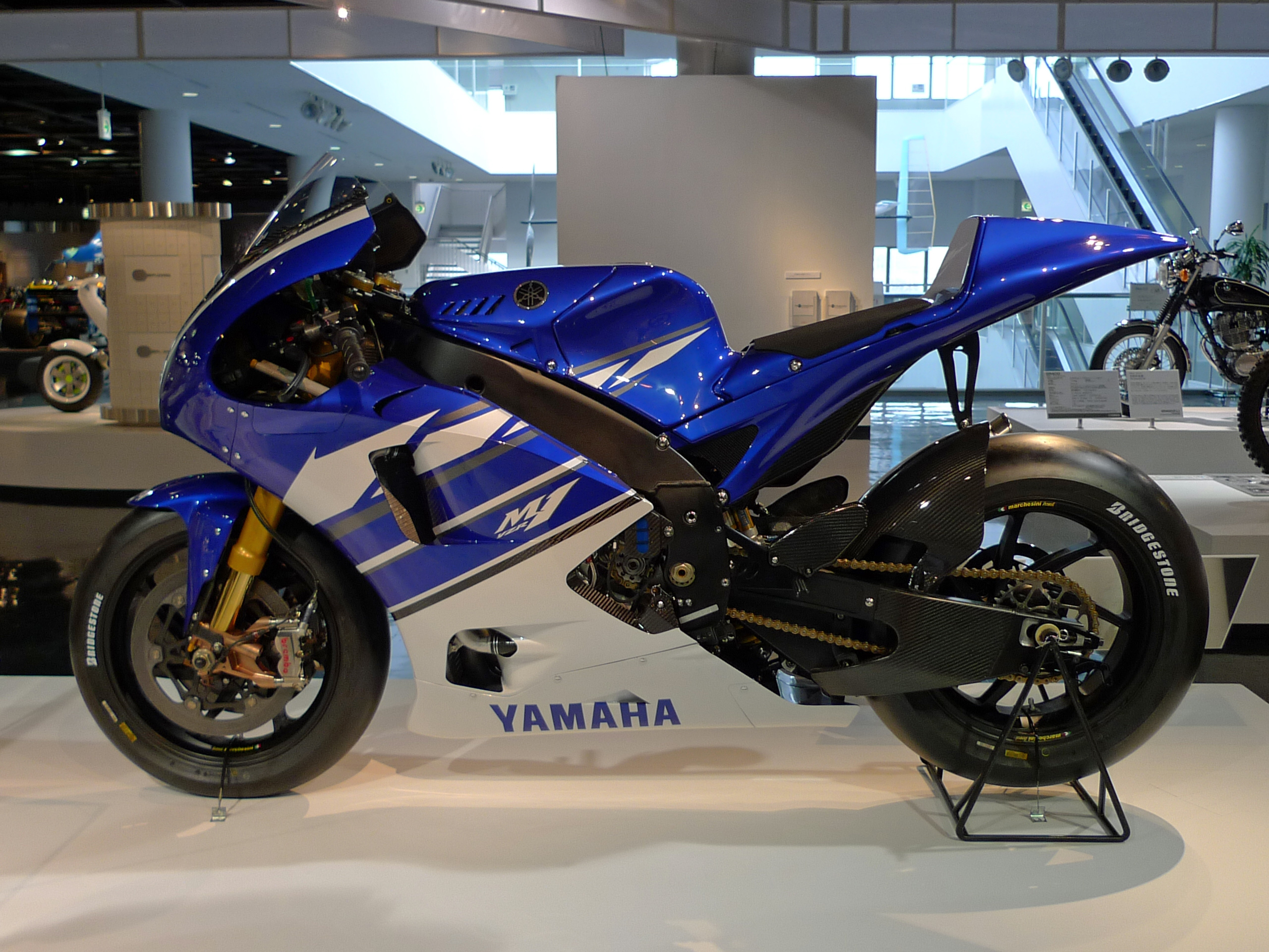 ヤマハ・YZR-M1 2010 左側面 ヤマハコミュニケーションプラザにて撮影